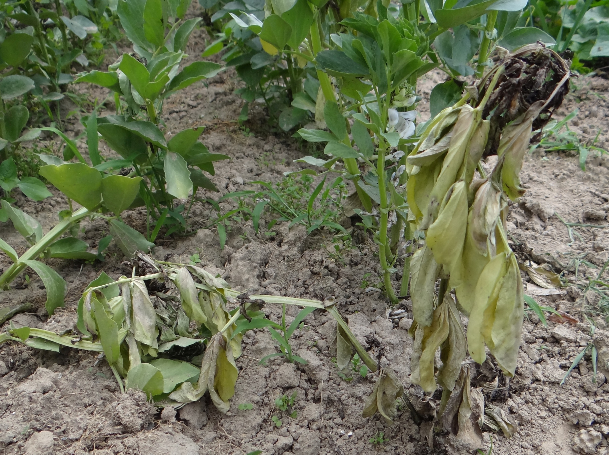 Diseases and disorders of Vicia